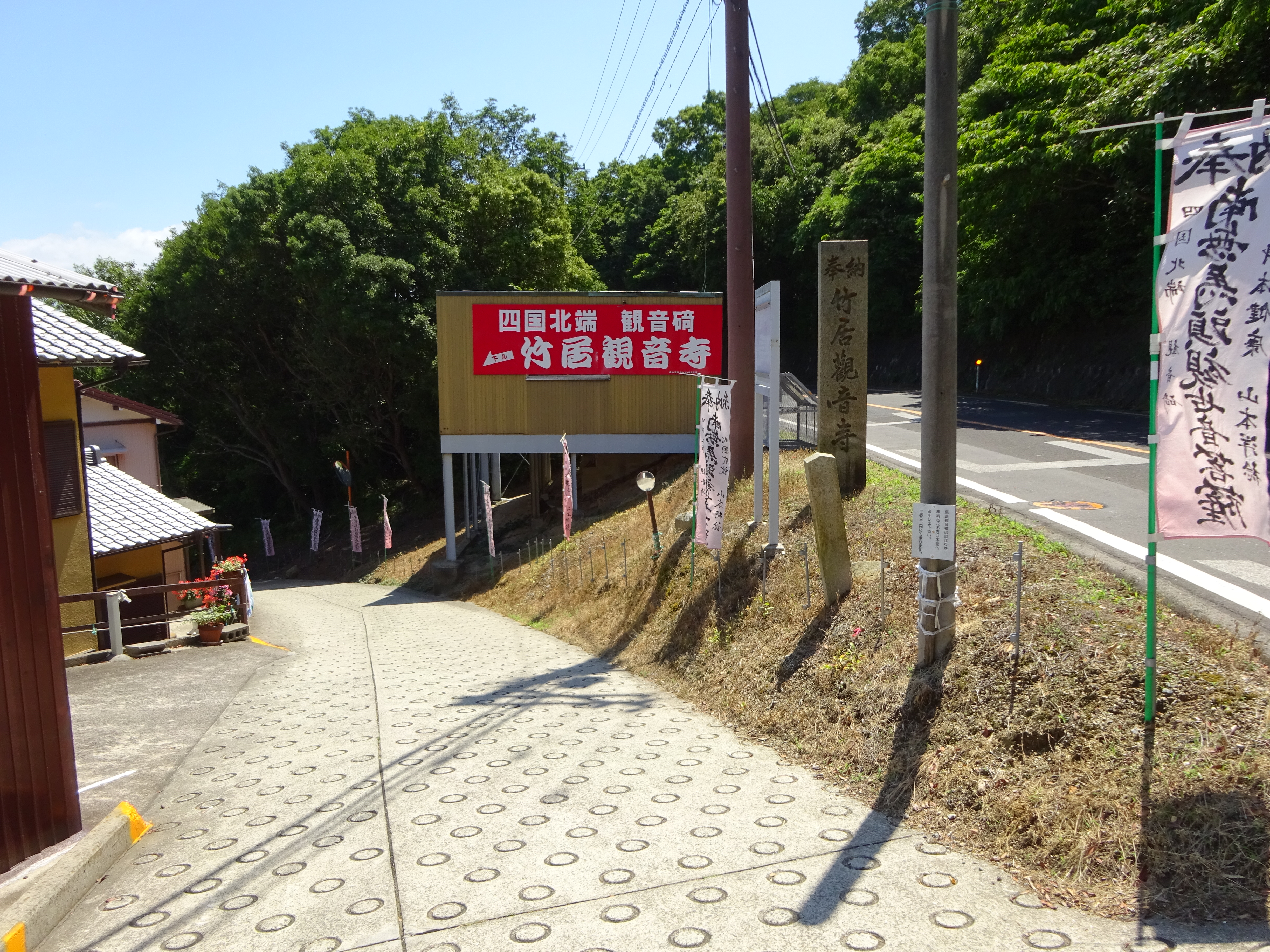 四国最北端の竹居岬（竹居観音寺）の入口